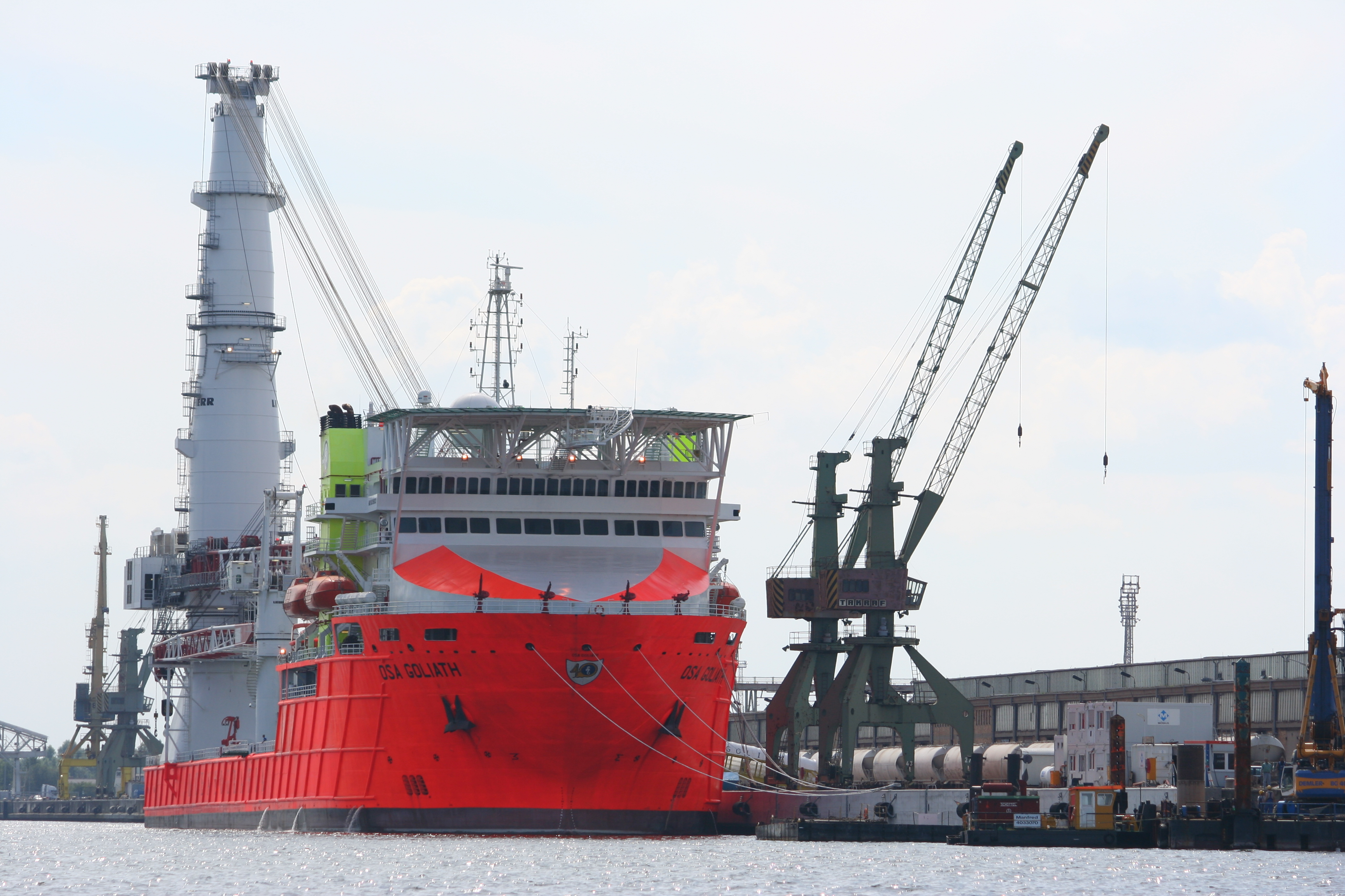 Hanse Sail 2009 - Rostock/Warnemünde - Osa Goliath bei Liebherr